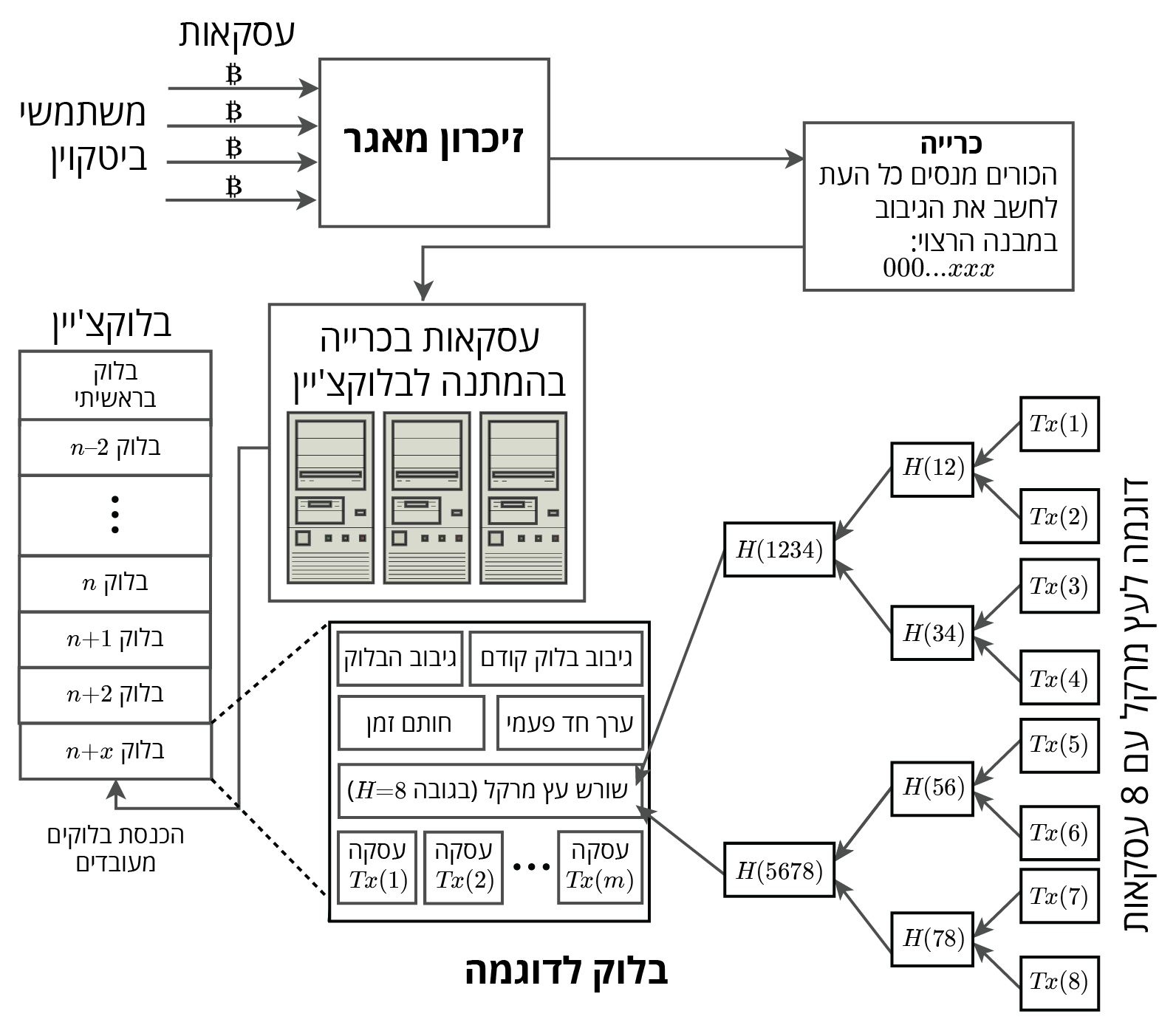 תיאור פרוטוקול ביטקוין